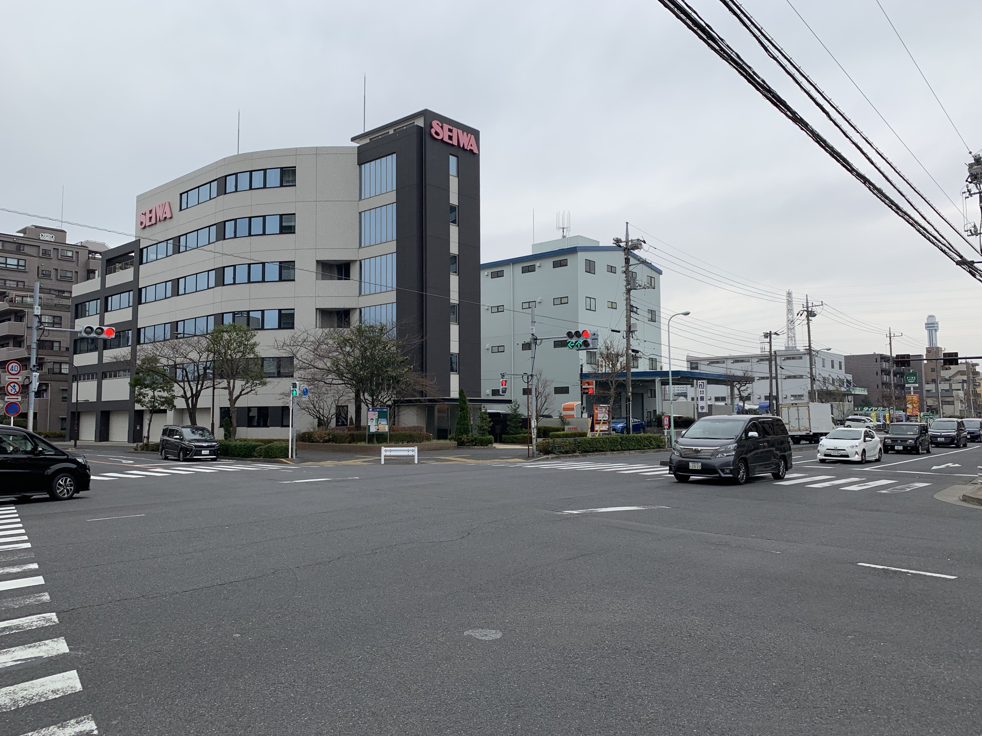 新大橋通りと一之江通りが交わる交差点の一之江７丁目側から、一之江町方面を望んだ写真